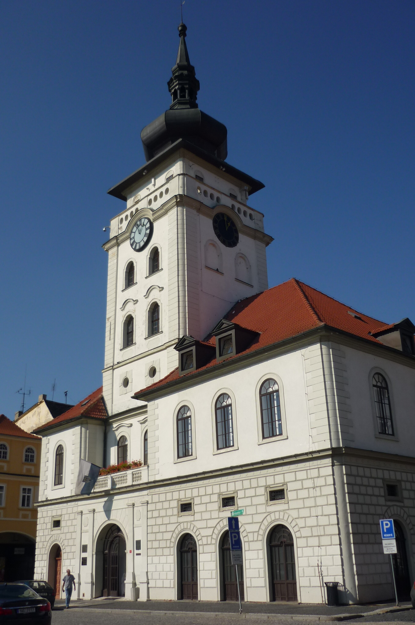 Rathaus von Saaz